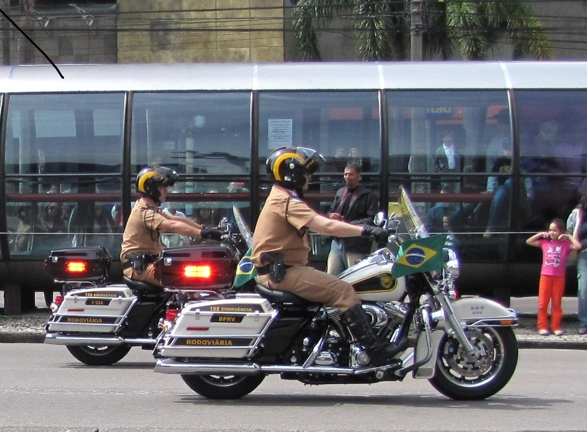 Motociclistas do Batalhão de Polícia Rodoviária da PMPR.